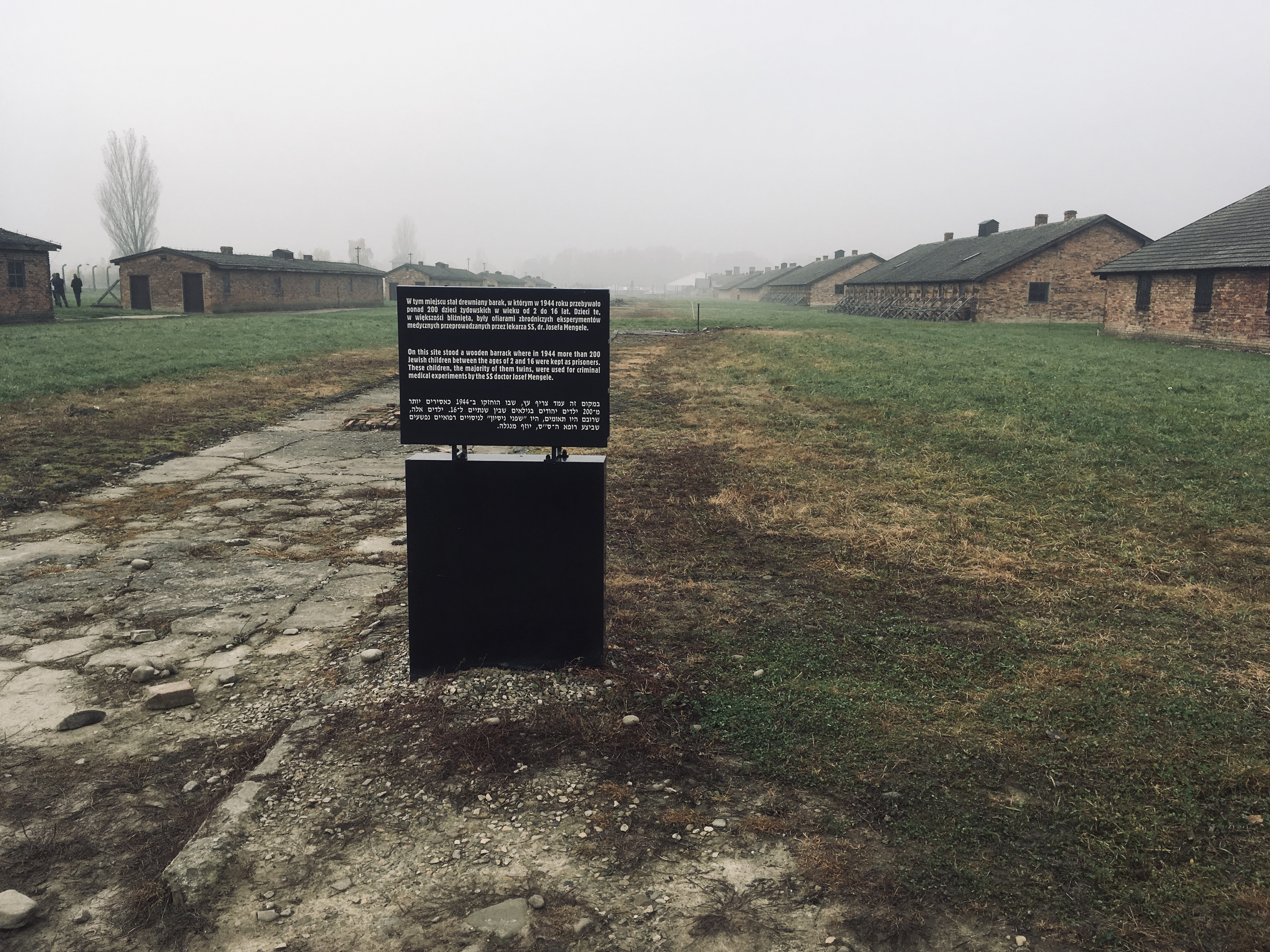 Resre du pavillon d'experimentation de Josef Menggele à Auschwitz ( Birkenau)